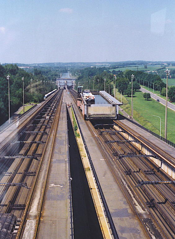 propre photoPhoto du plan incliné à Ronquières sur le canal Charleroi-Bruxelles